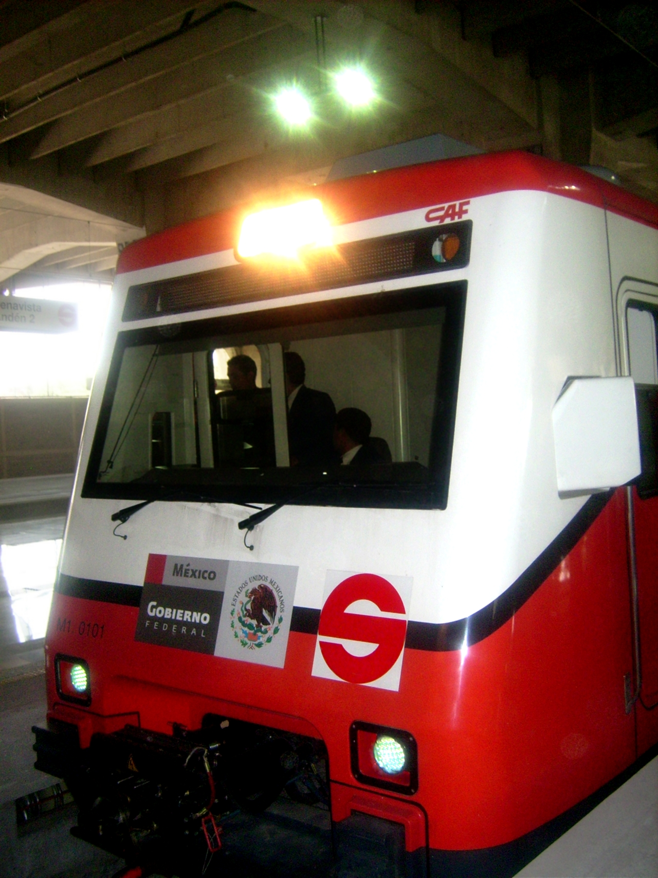 EMU en el interior de la estación Buenavista del sistema 1 del Ferrocarril Suburbano de la Zona Metropolitana del Valle de México (tren suburbano)